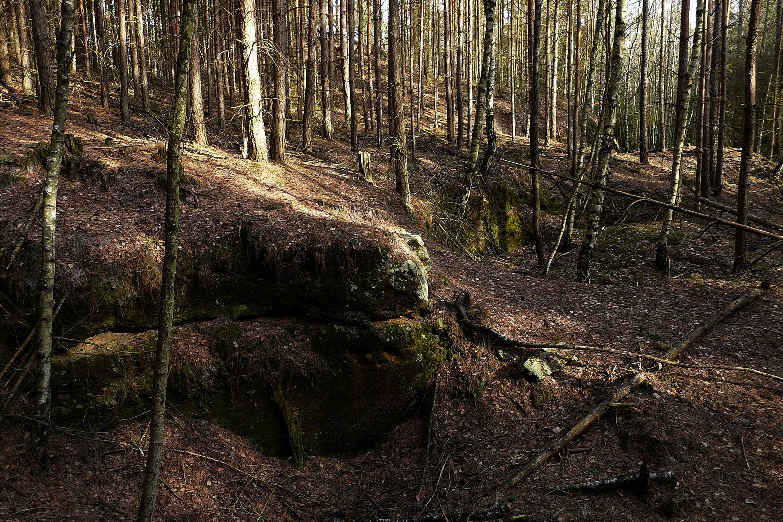 Západní svah Malého Radechova